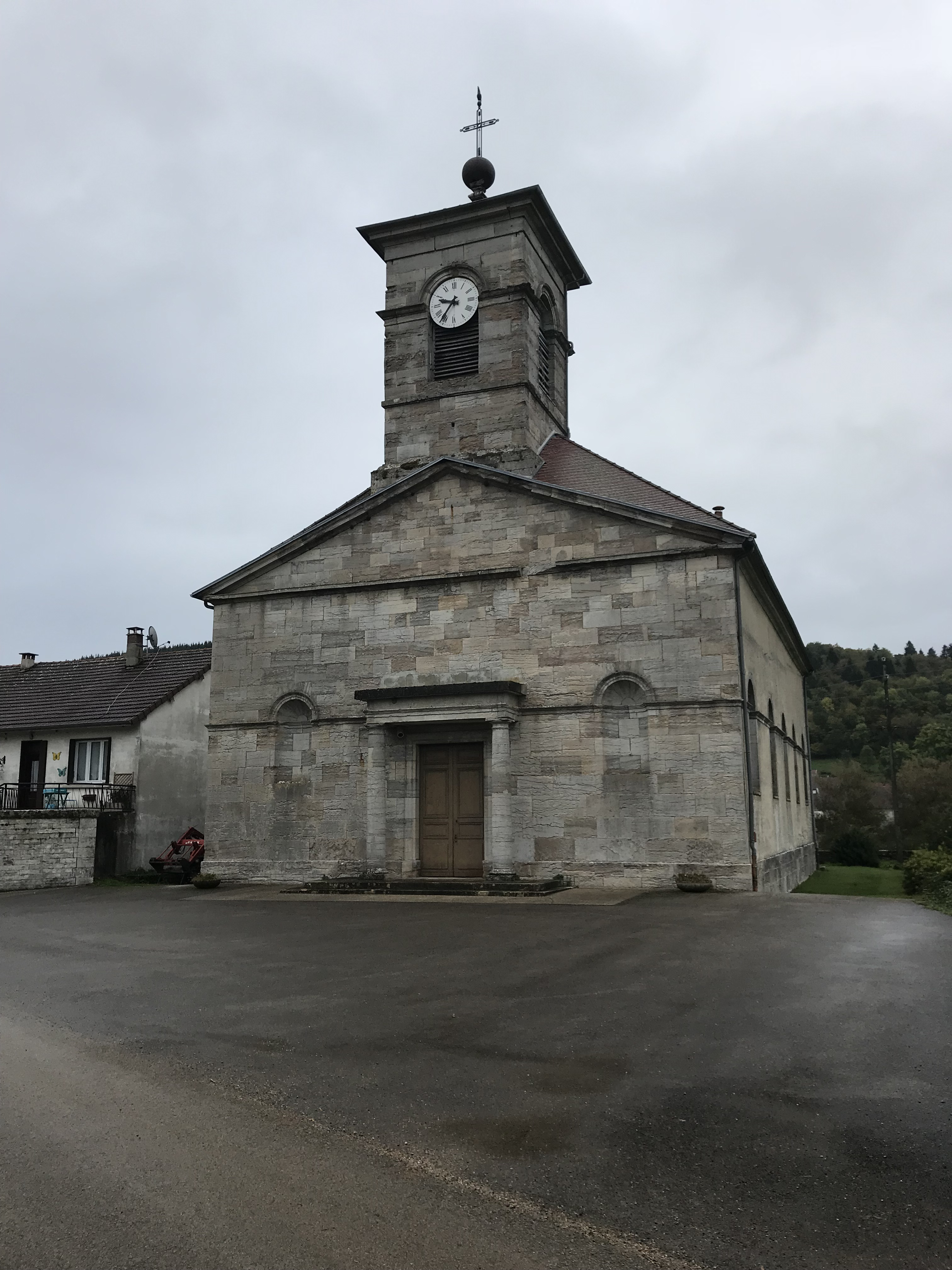 Chavéria (Jura, France) en octobre 2017.